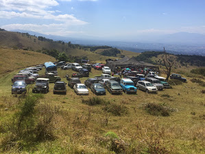 Vista de los carros que transportaron los asistentes a la Zona Protectora El Chayote